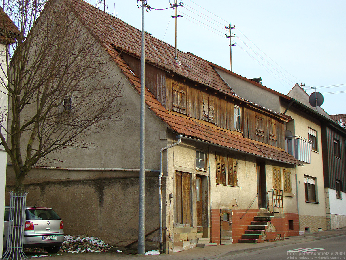 Ehemaliges jüdisches Wohn- und Geschäftshaus in Schwaigern-Massenbach.